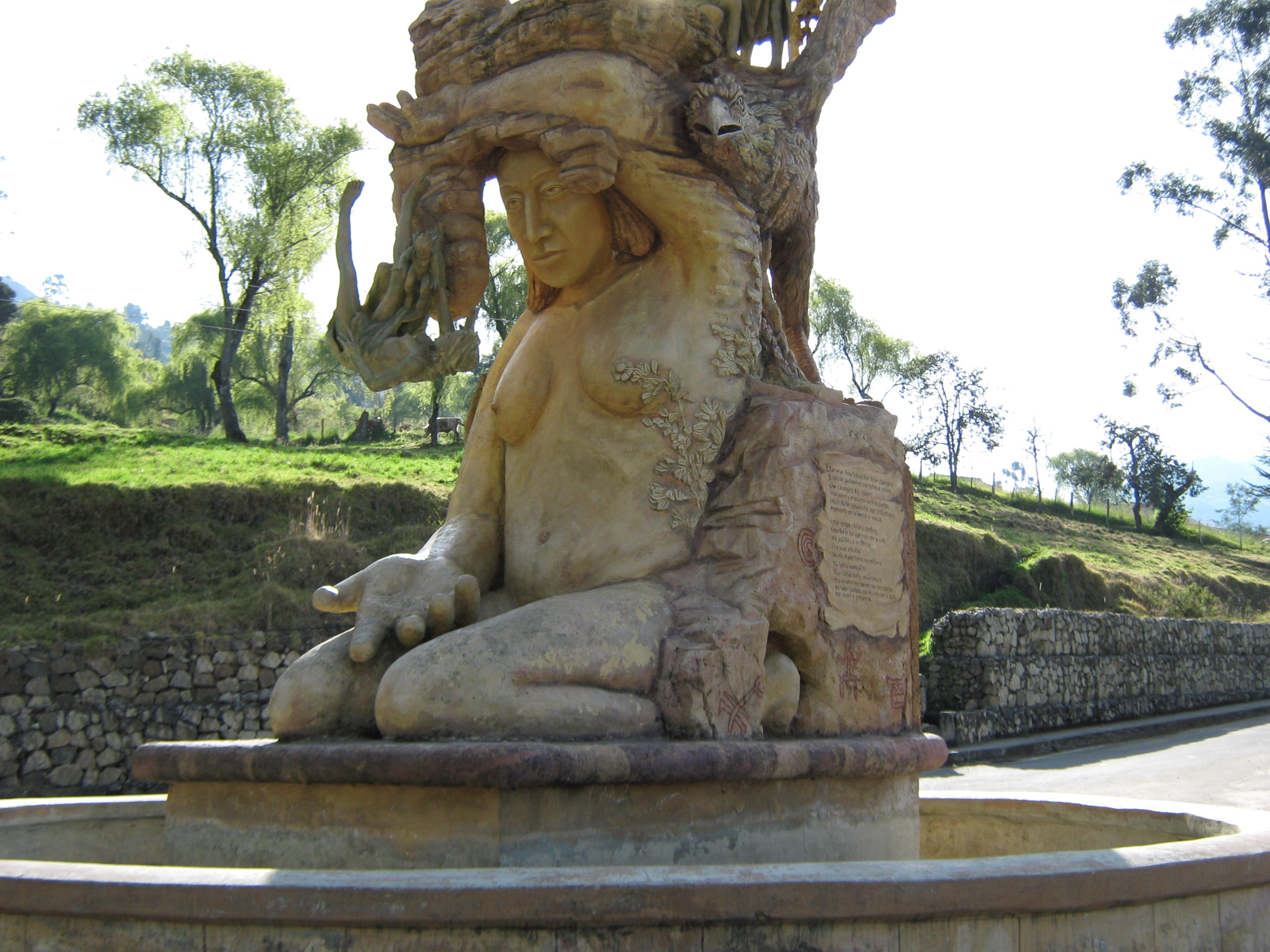 Monumento a la dignidad de la raza u‘wa en el municipio de Guicán Boyacá Colombia